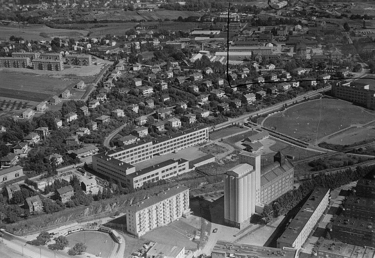 Sinsen, Trondheimsveien, Sinsen skole, kornsilo, trikkesløyfe, Olav Hegnas vei, Breisjåveien, Sinsenveien (Flyfoto).